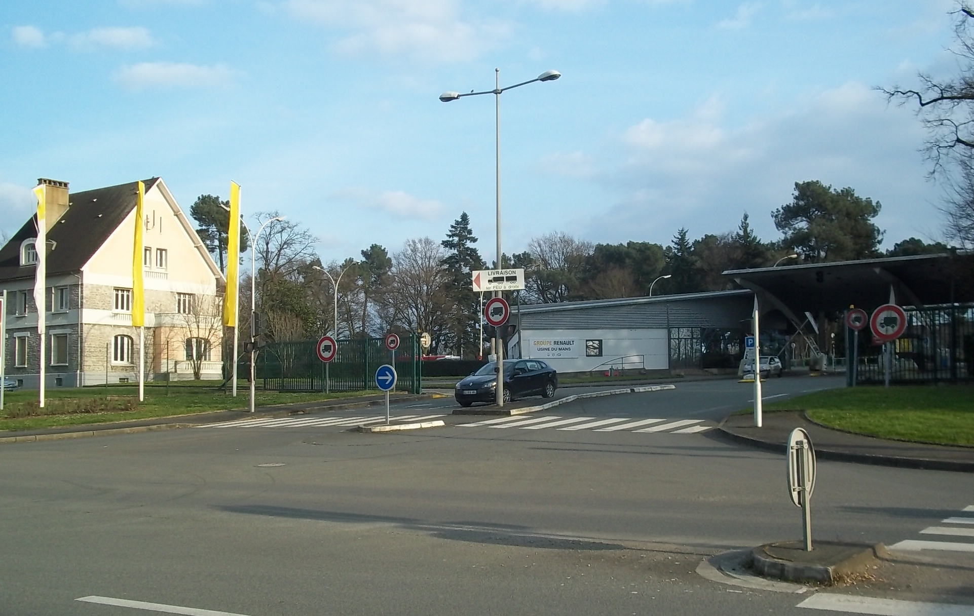 Entrée de l'usine Auto Chassis International (Renault) Le Mans